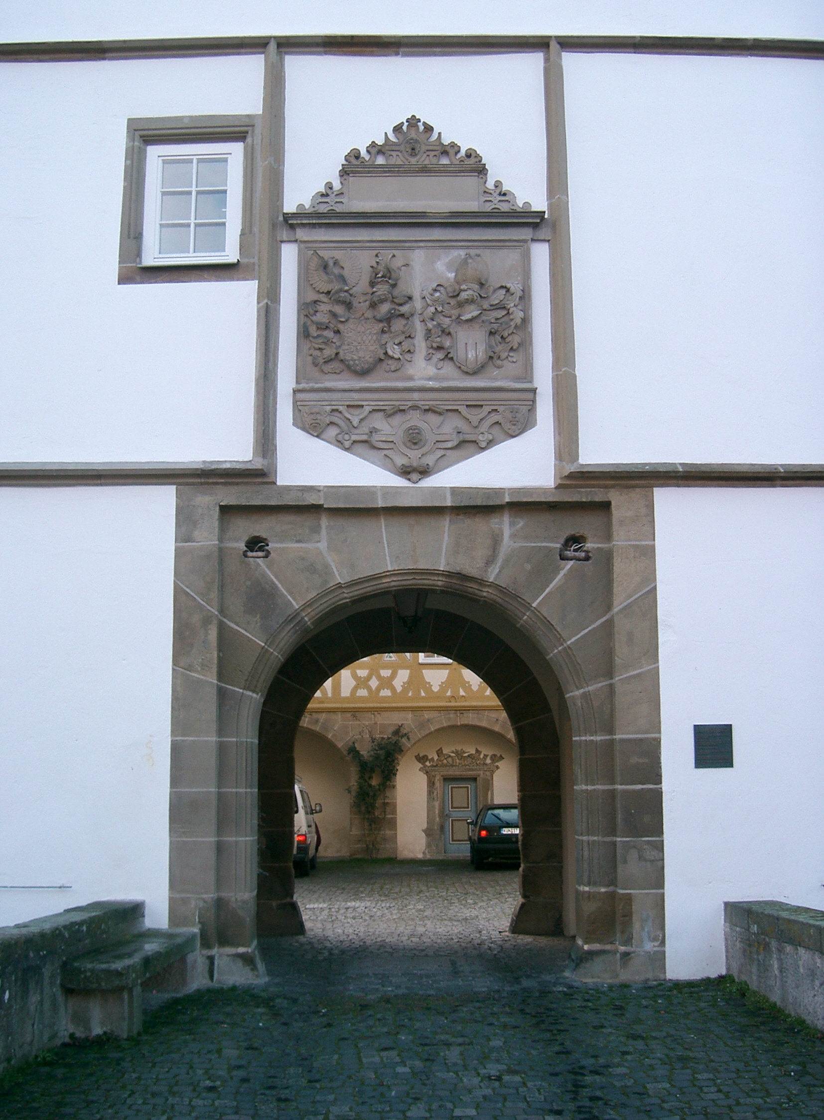 Tor zum Pfedelbacher Schloss mit Allianzwappen Hohenlohe / Tübingen